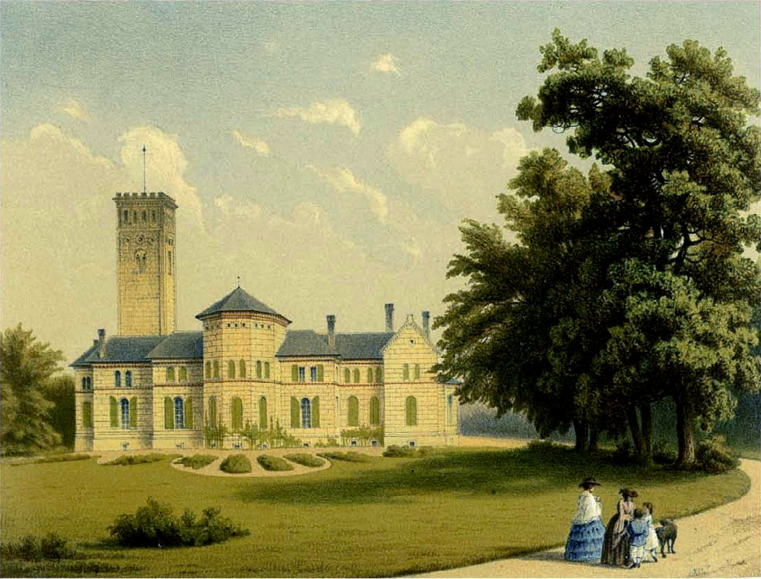 Schloss Ramstedt, Lithografie aus dem 19. Jahrhundert